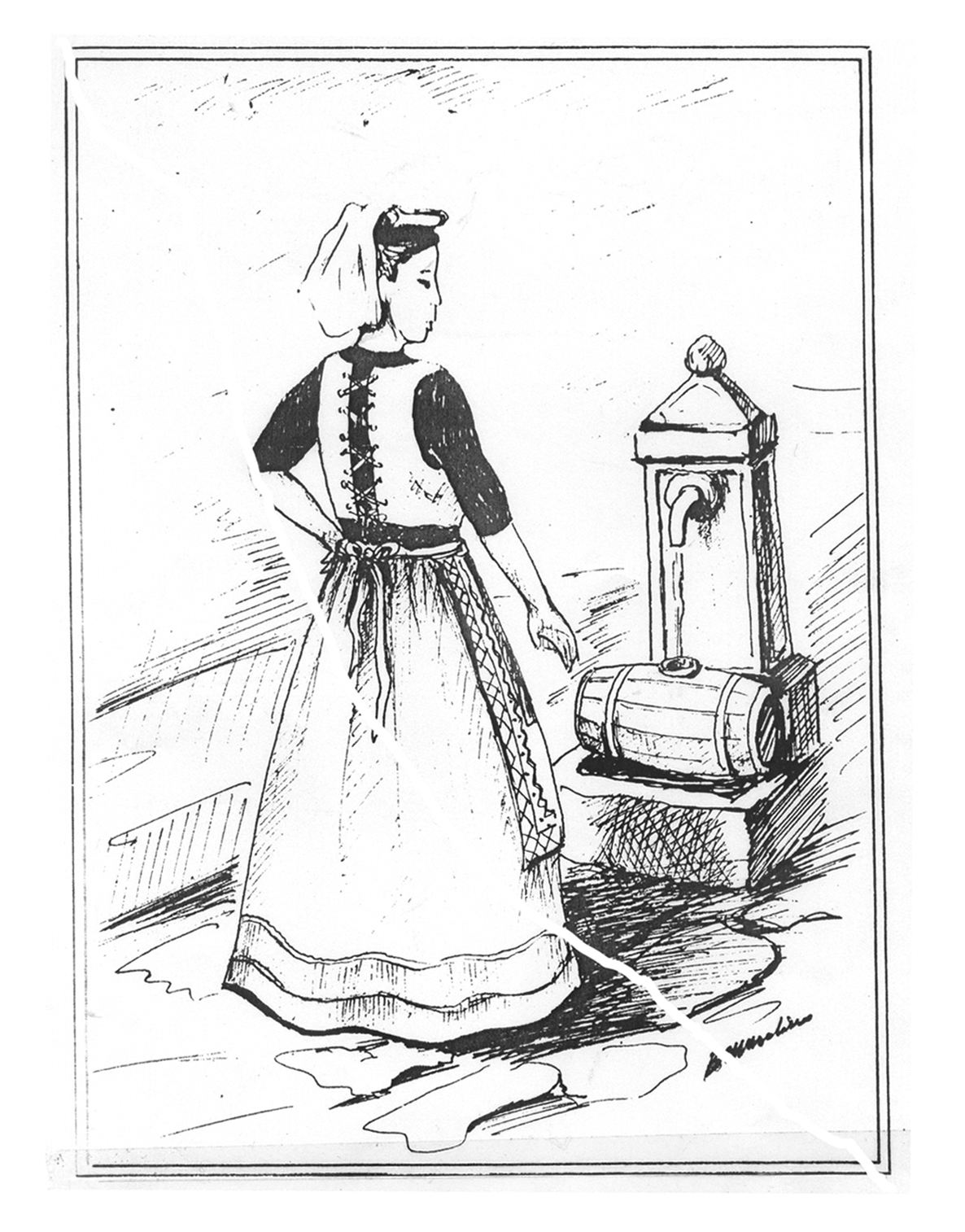 Costume donna soveritana